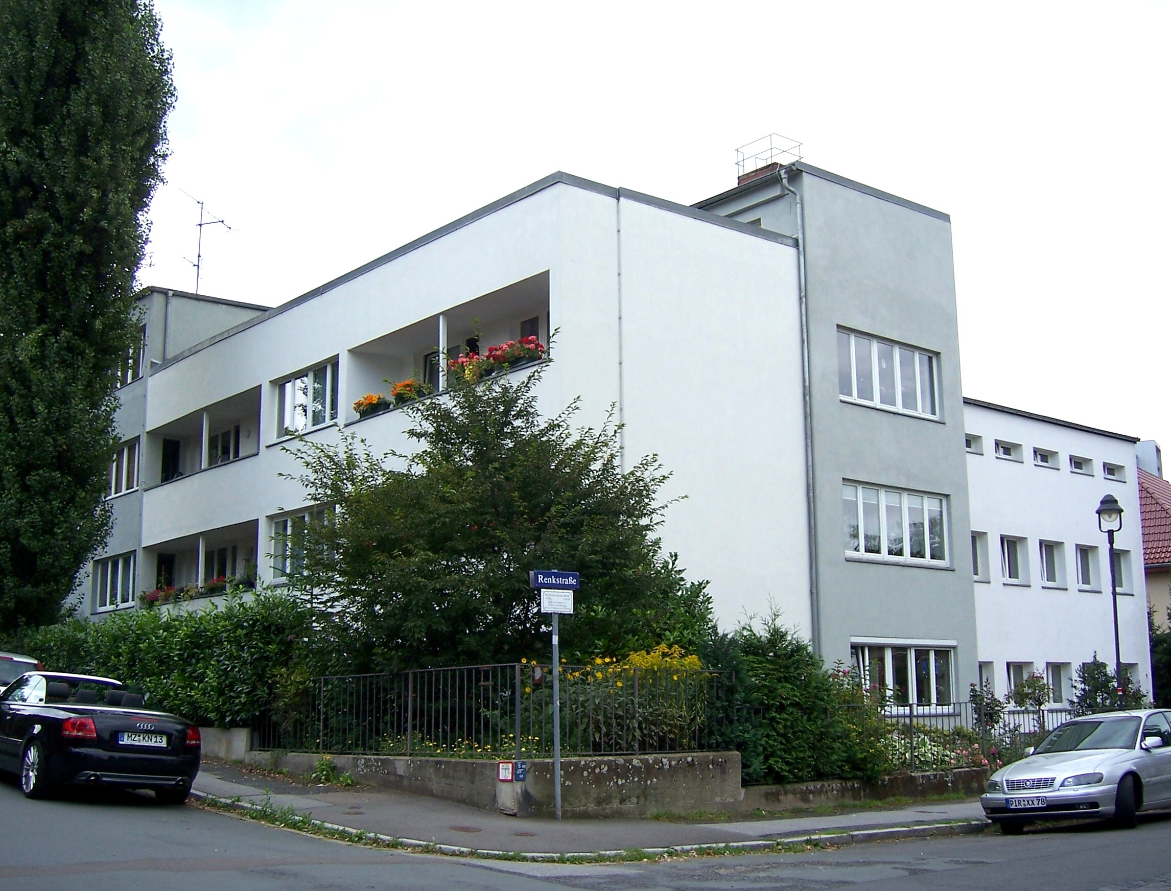 Das denkmalgeschützte „Haus Garten“ in der Dresdner Südvorstadt